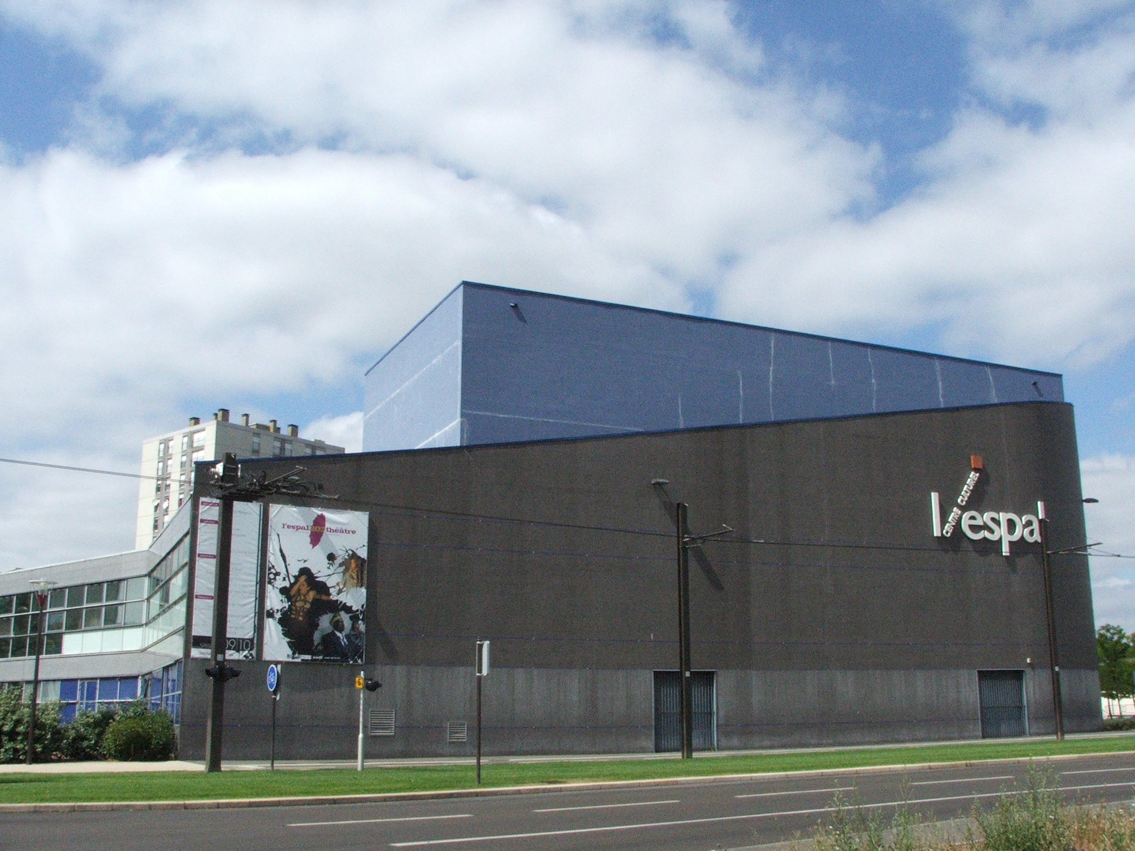 Le théâtre de l'Espal dans le quartier des Sablons au Mans.